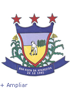 Brasao de boa vista da aparecida pr